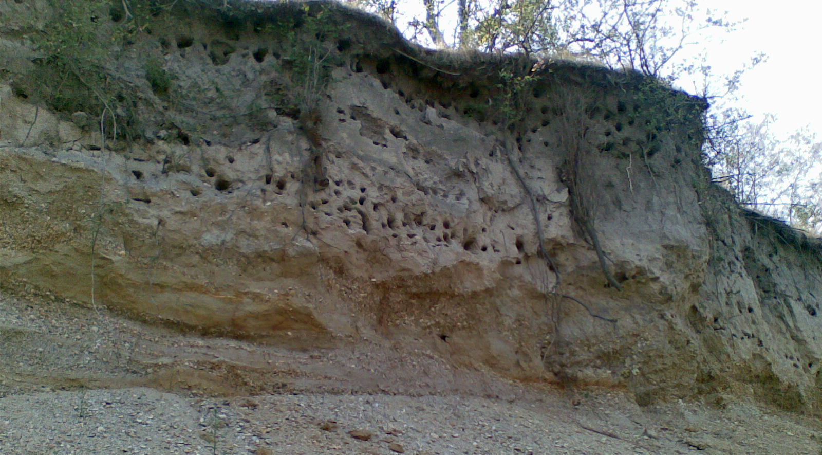 Hnízdní nora vlhy pestré,břeh Dunaje,Maďarsko